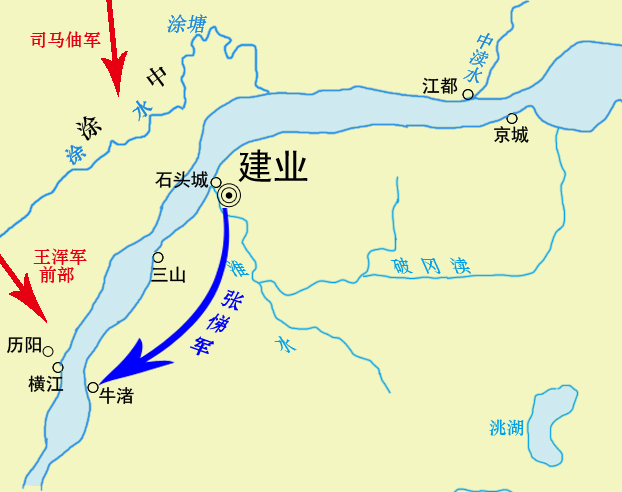 晋灭吴之战东线情形